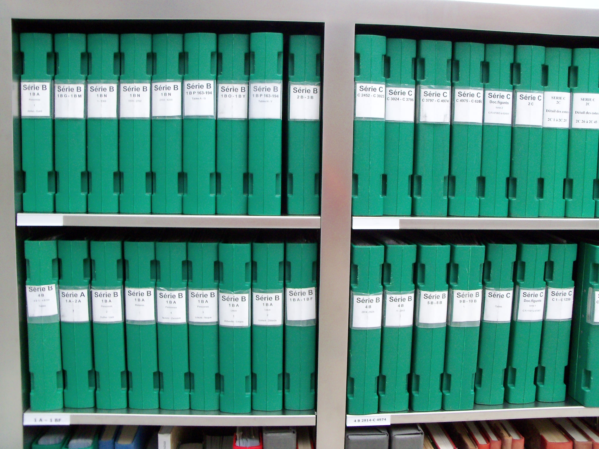 Répertoires de la série B et de la série C dans la salle de lecture des Archives départementales d'Ille-et-Vilaine. 2010.